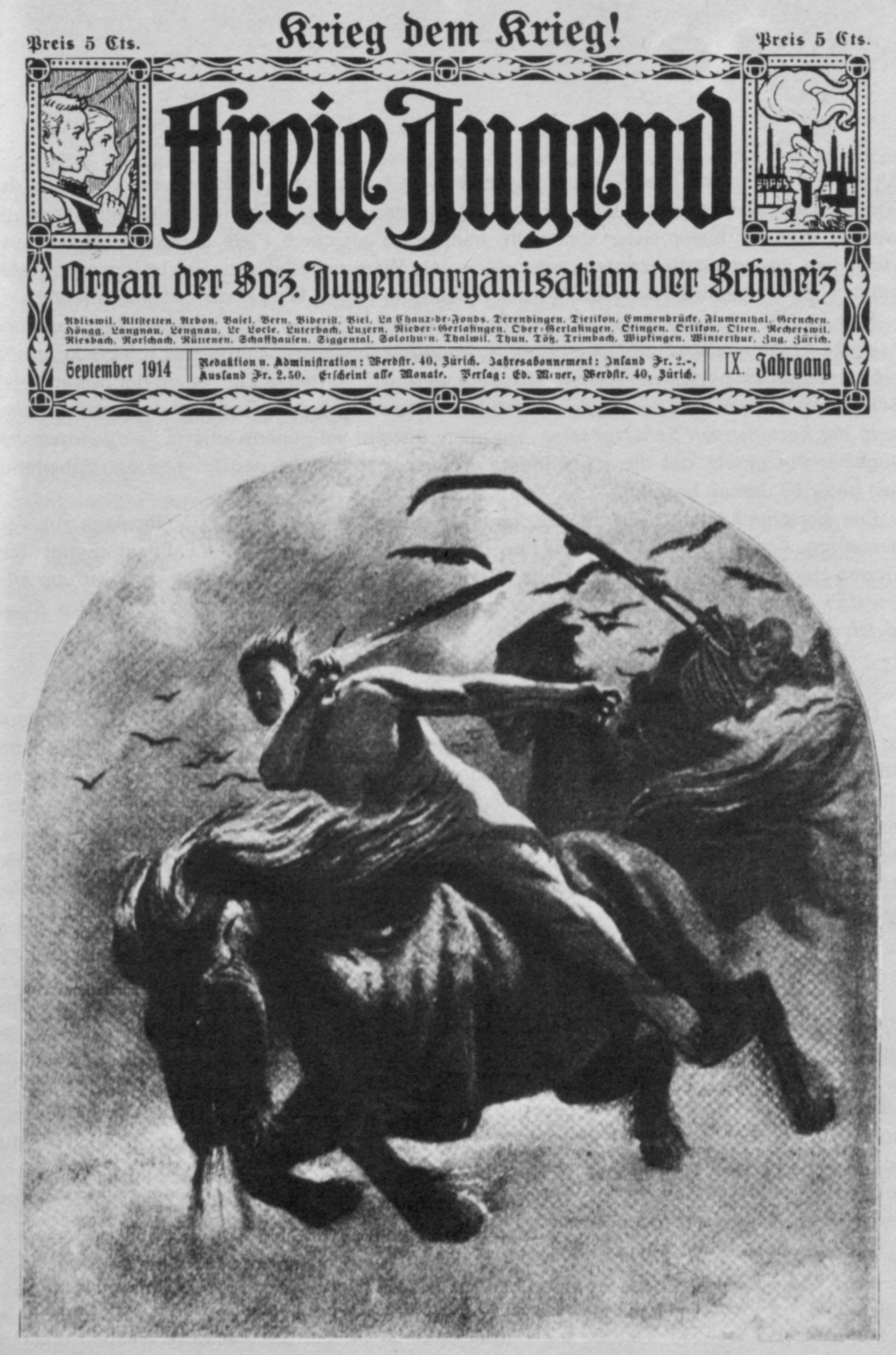 Titelseite der Zeitschrift «Freie Jugend» der jungsozialistischen Bewegung der Schweiz im September 1914. Der Redaktor Willi Münzenberg wandte sich darin klar gegen Militarismus und Krieg und erklärte «dem Krieg den Krieg».